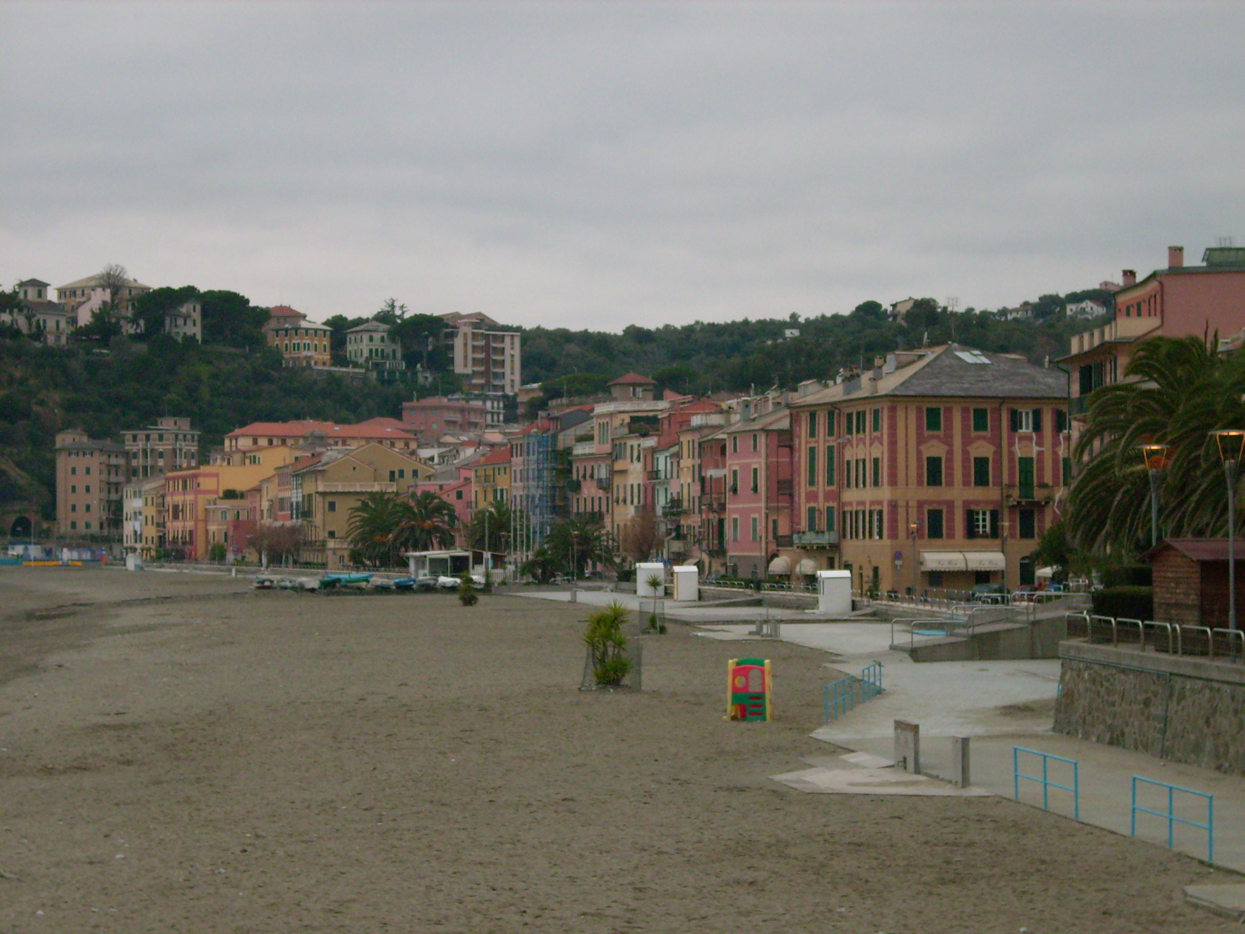 Celle Ligure, Liguria, Italy